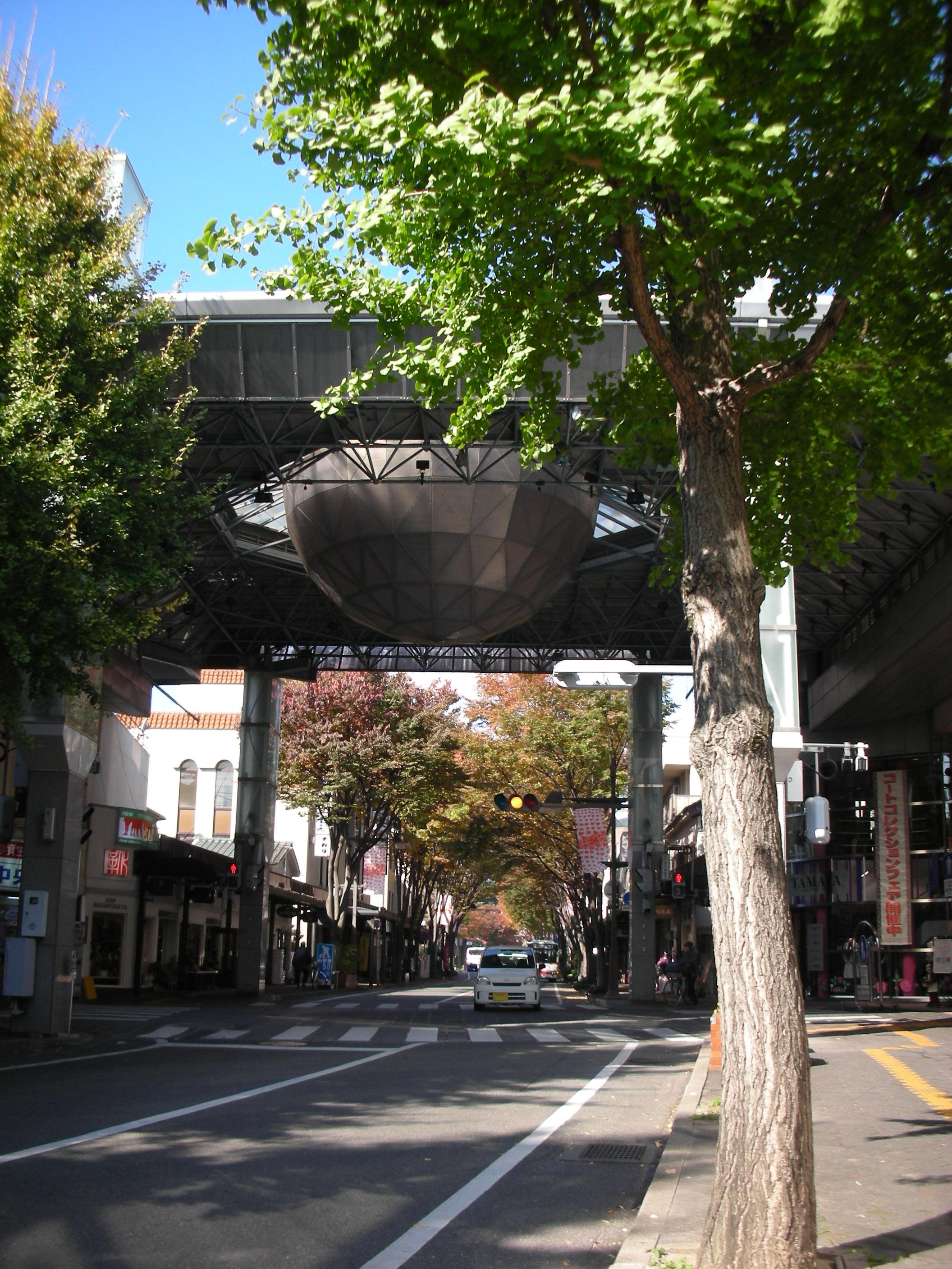 山口市中心商店街のシンボル「魔法の屋根」